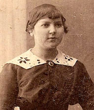 Taidemaalari Signe Yletyinen